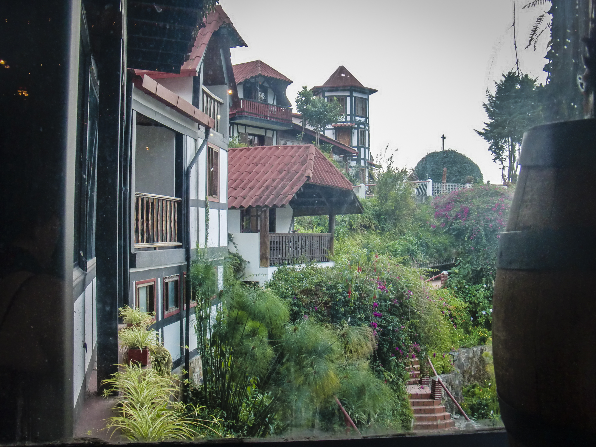 Colonia Tovar, Aragua, Venezuela